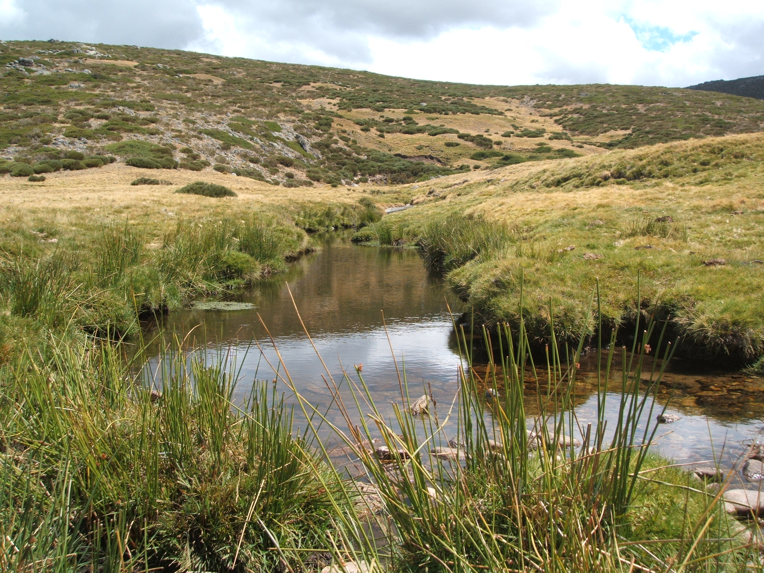 Curso alto del Corneja (Ávila, España) en la Dehesa de Serrota. AUTOR: Alfredo (con permiso del autor)